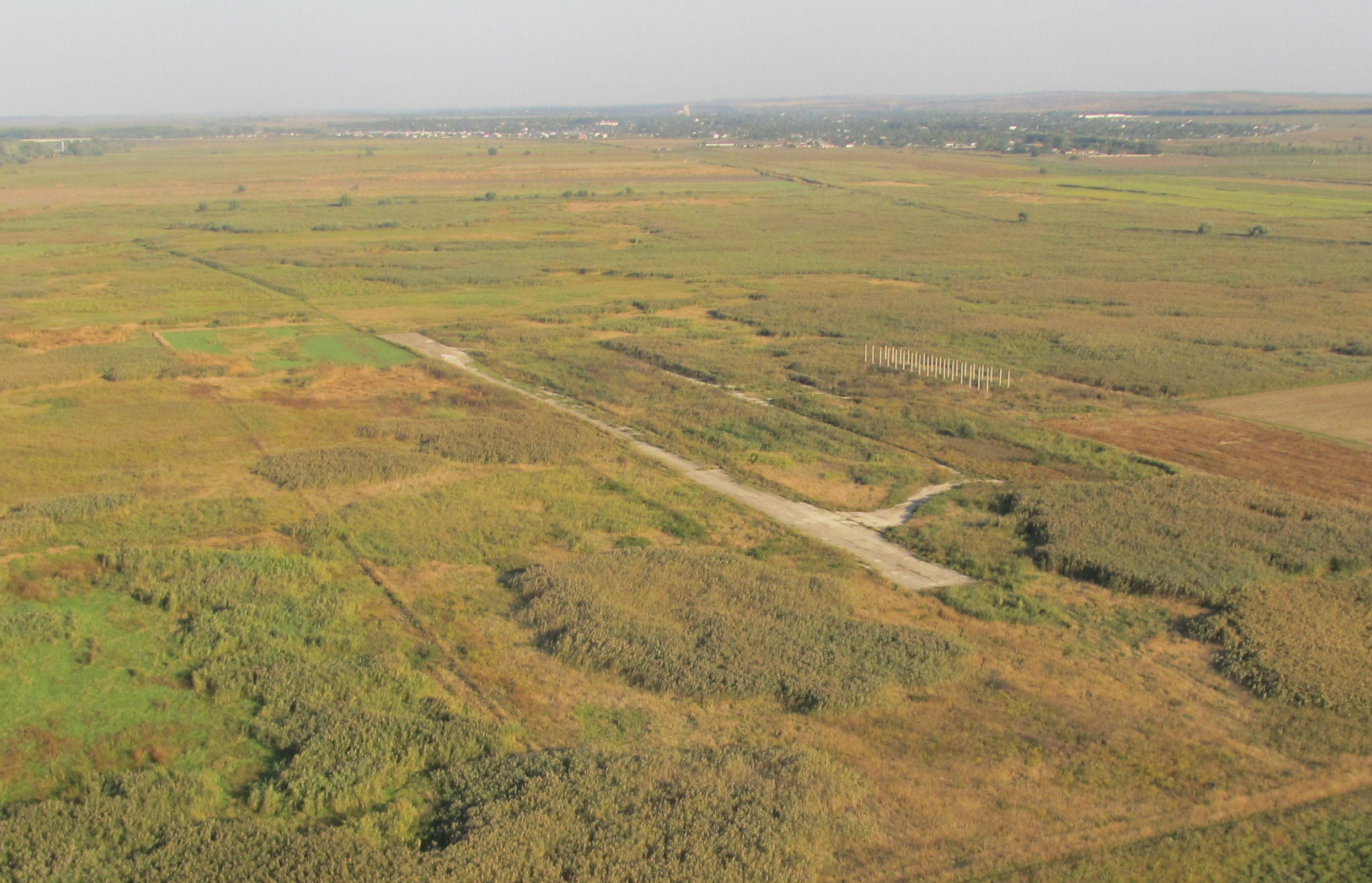 Позабытая площадка "Варениковская"